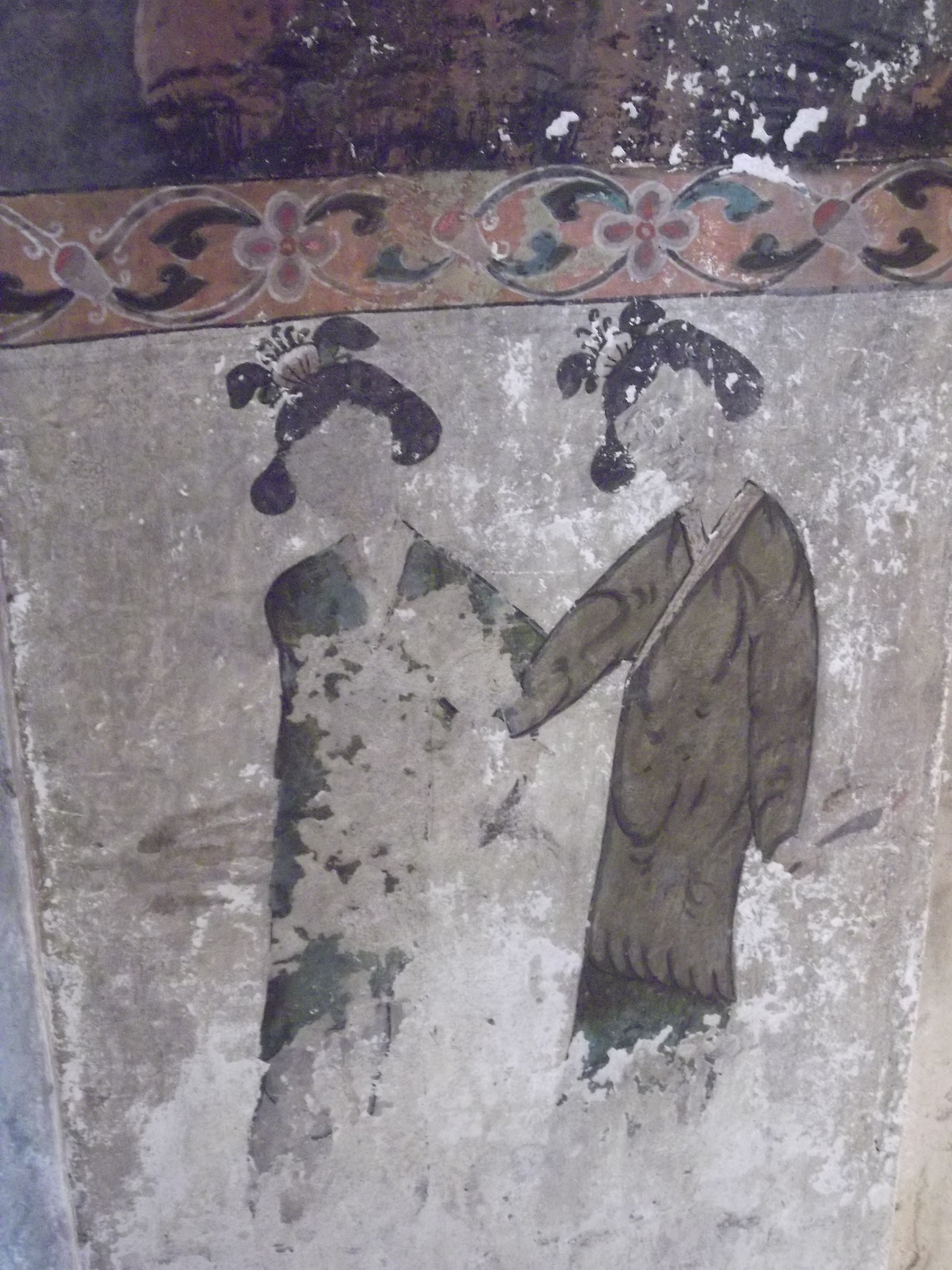 วัดราชบูรณะ ตำบลในเมือง อำเภอเมืองพิษณุโลก จังหวัดพิษณุโลก